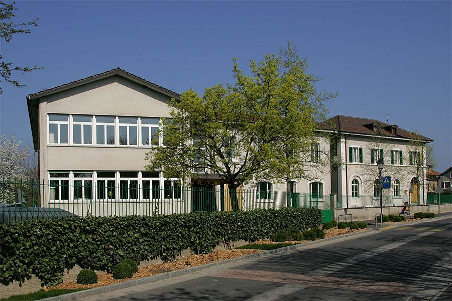 Primarschulhaus in Corsier